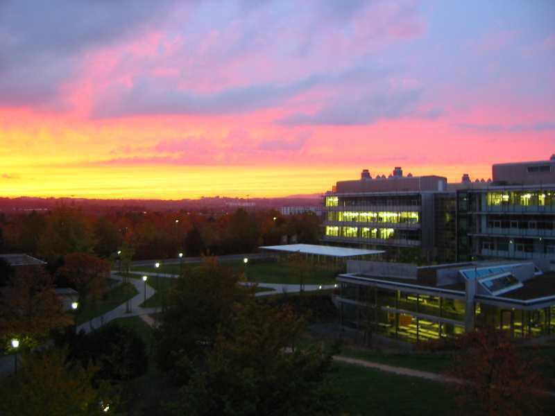 Johannes Gutenberg Universität Mainz, Blick auf den Neubau des Fachbereichs Chemie und den Ortsteil Mainz-Finthen im Hintergrund. Fotografiert aus dem 5.Stock des Staudingerweg 9, Mainz (Institut für Informatik am Fachbereich Mathematik,Physik und Informatik). weitere Versionen: 1024*768